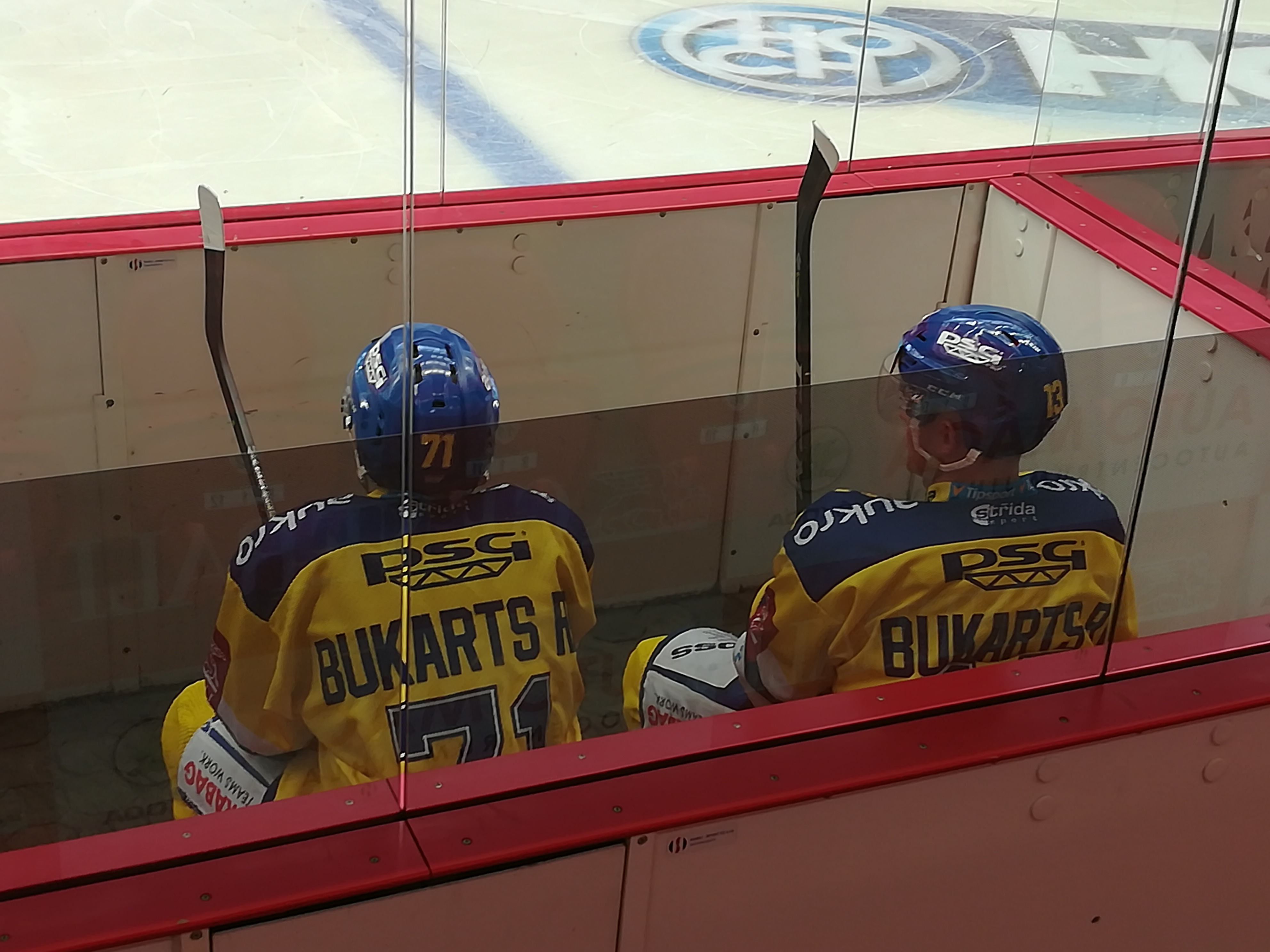 Robert Bukarts a Rihards Bukarts na trestné lavici v utkání HC Dukla Jihlava - Aukro Berani Zlín v sezóně 2017/18